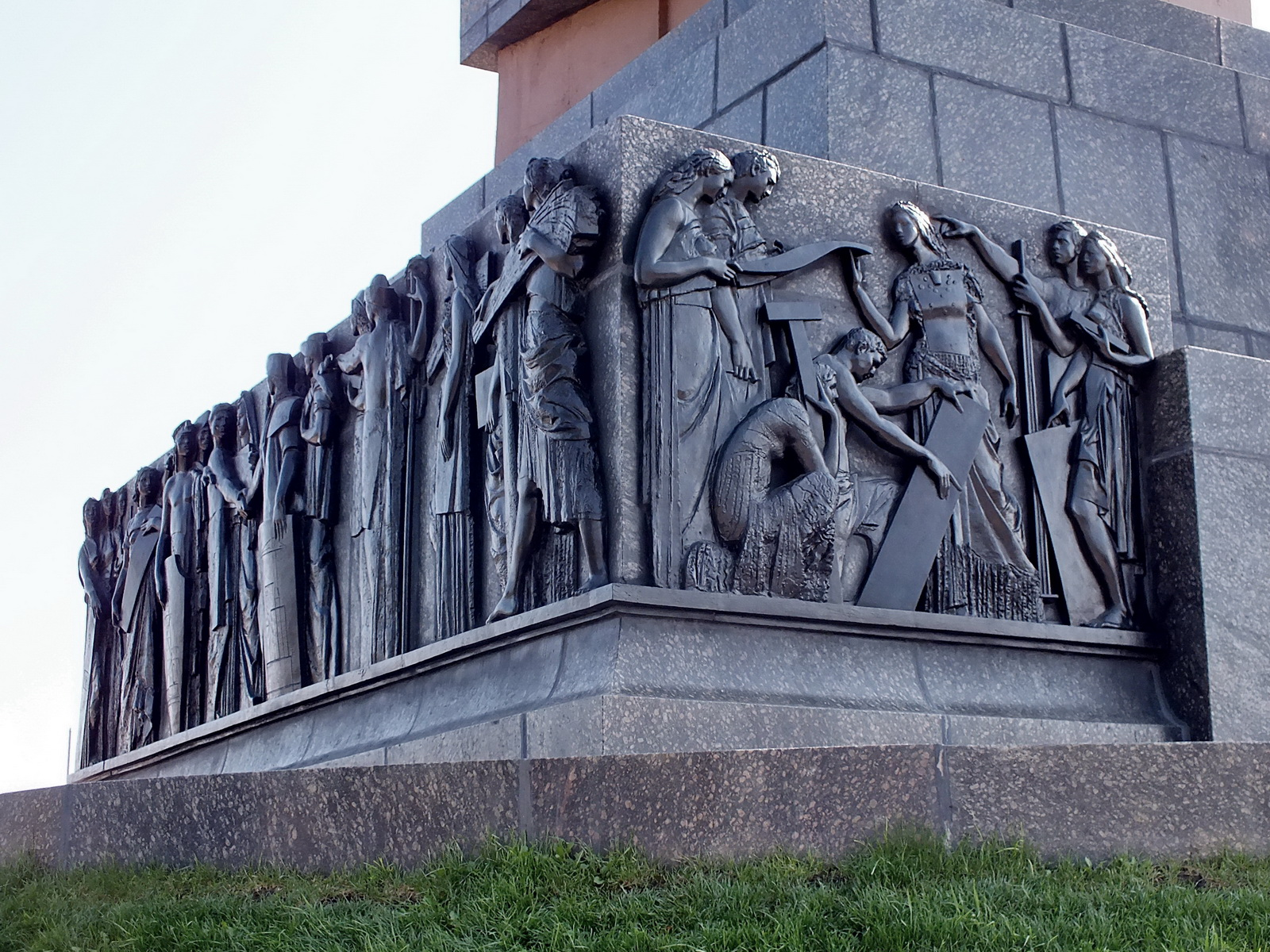 Монумент Дружба в честь 400-летия добровольного присоединения Башкирии к России: площадь Первомайская, Уфа, Башкортостан